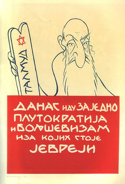 Srpski (latinica): Nacistički propagandni plakat protiv Jevreja.iz Drugog svetskog rata.